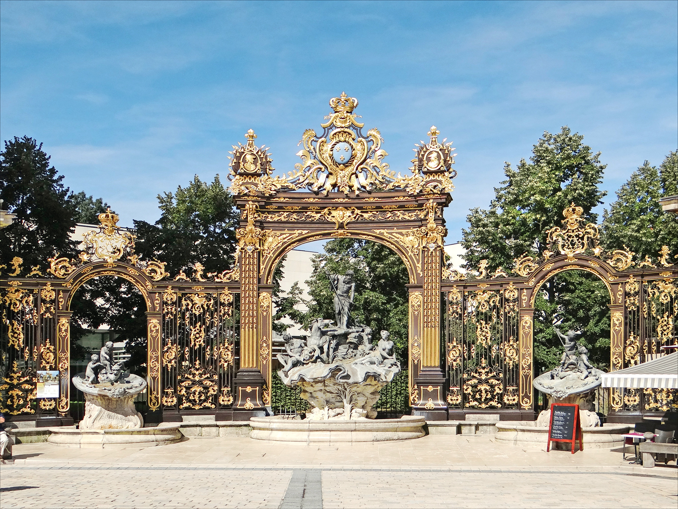 Fontaines de Guibal et ferronneries de Jean-Baptiste Lamour (1698- 1771) de la place Stanislas à Nancy réalisées entre 1751 et 1755 dans le style Louis XV. ...la fontaine Neptune présente une statue du dieu brandissant un trident et surplombant des enfants à cheval sur des dauphins. Les deux baies latérales encadrent deux autres fontaines. Dans la petite fontaine de gauche, on voit un enfant qui pleure. Article de Wikipedia sur la place Stanislas